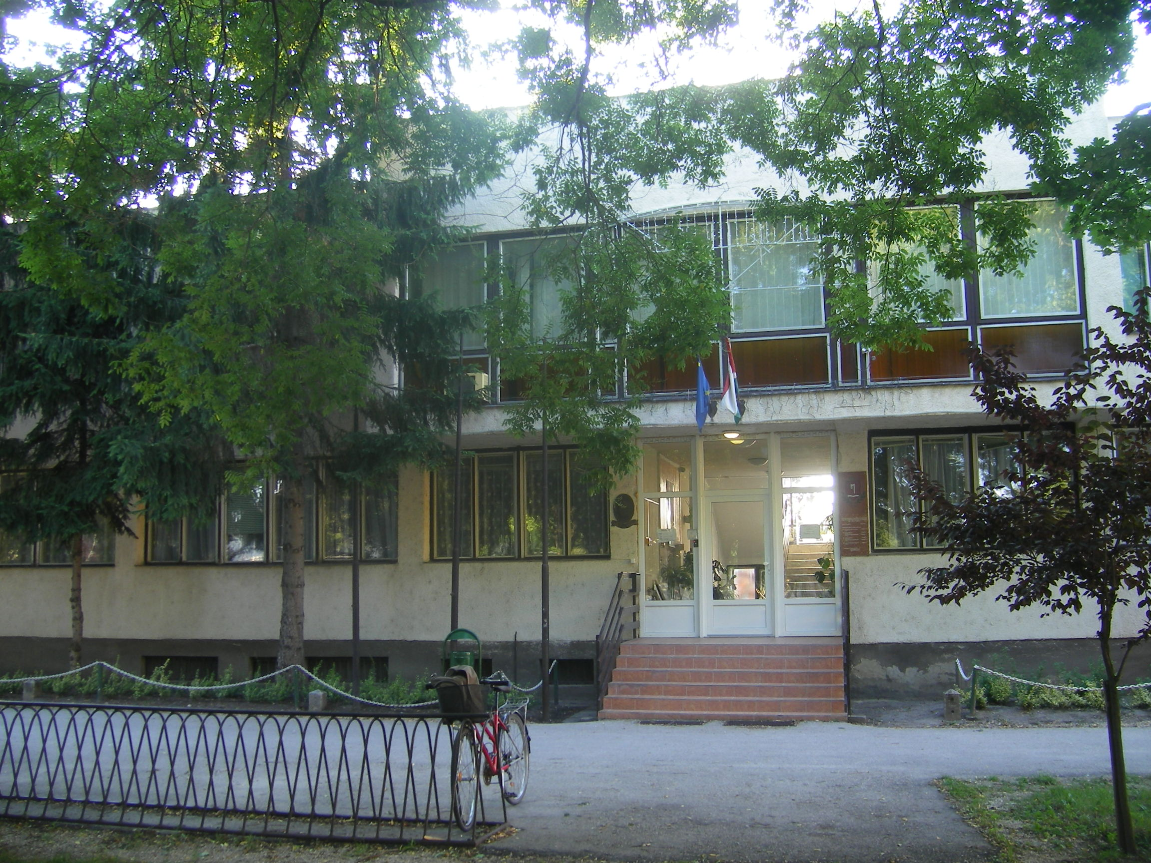 Ács - városháza